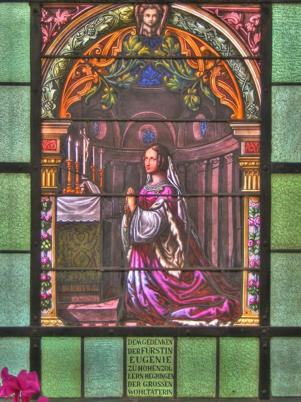 Fenster zum Gedenken an Fürstin Eugenie in der Stiftskirche Hechingen